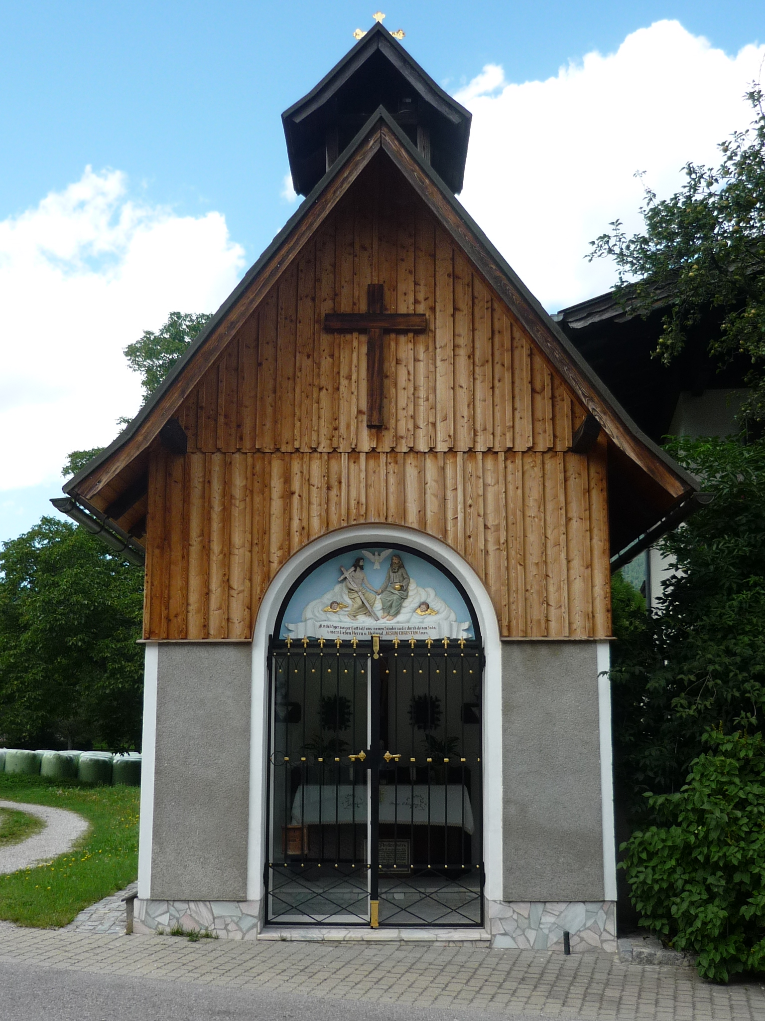 Das Christus Denkmal in der Marktgemeinde Puchberg am Schneeberg im südlcihen Niederösterreich.